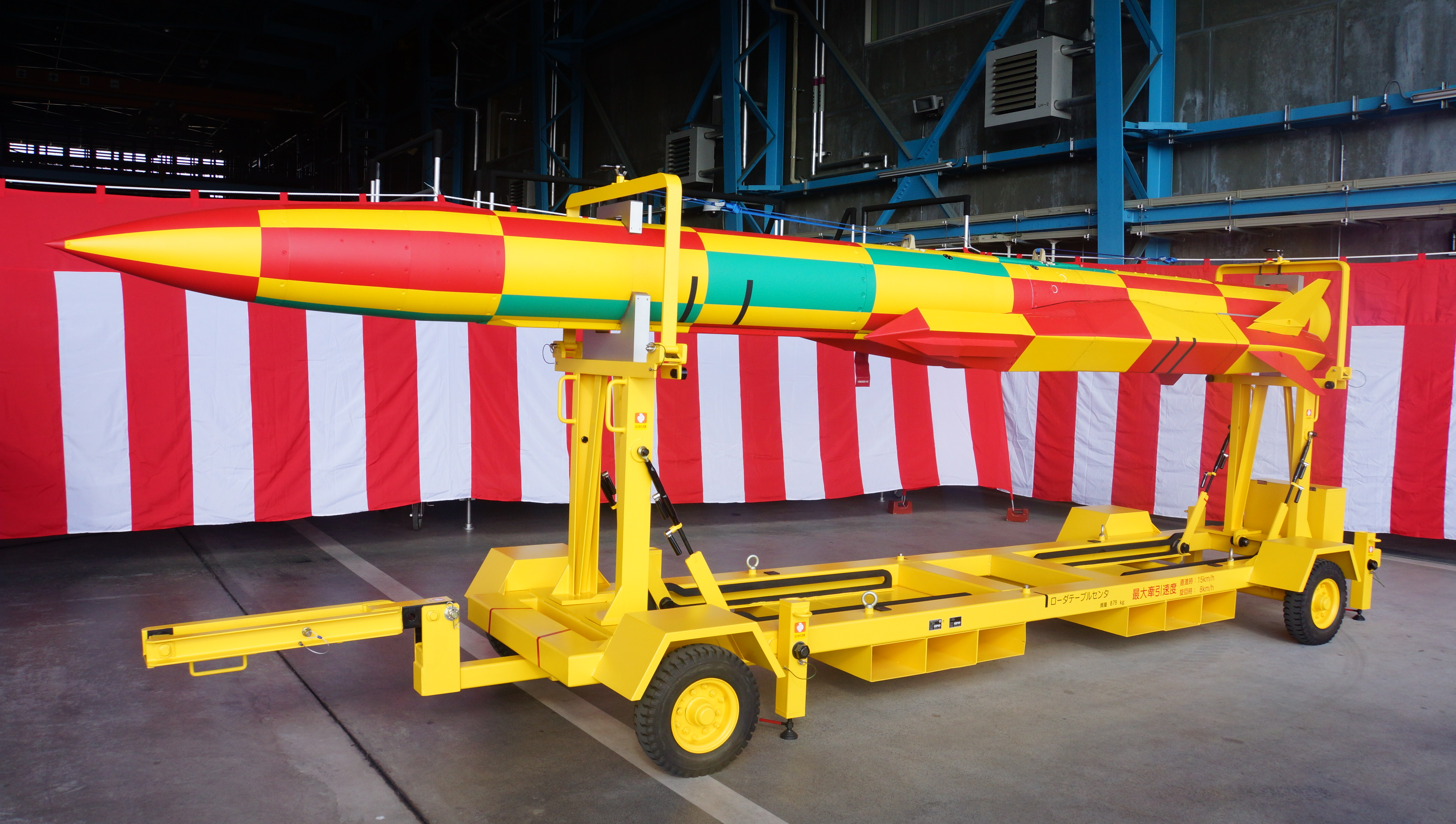 航空自衛隊 新空対艦誘導弾（XASM-3） ダミー飛しょう体A型。 14年11月23日 航空自衛隊岐阜基地にて。